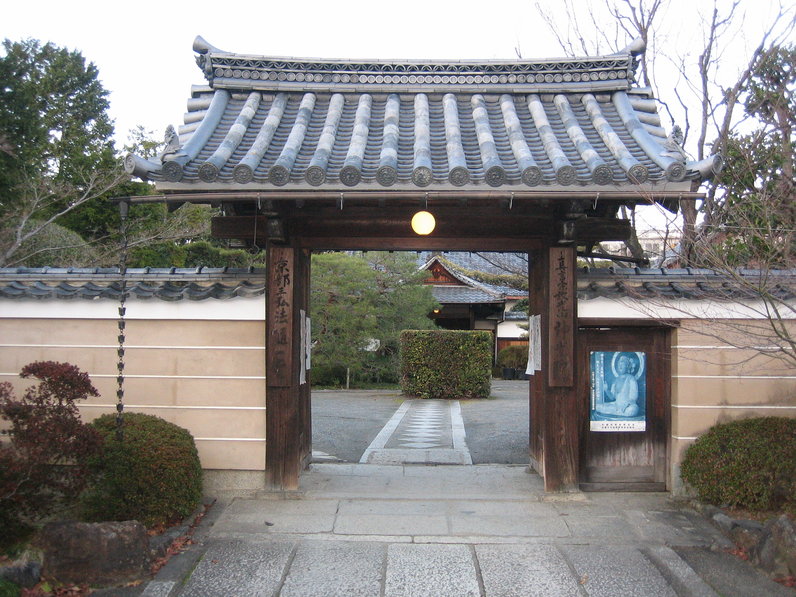 神光院山門を撮影